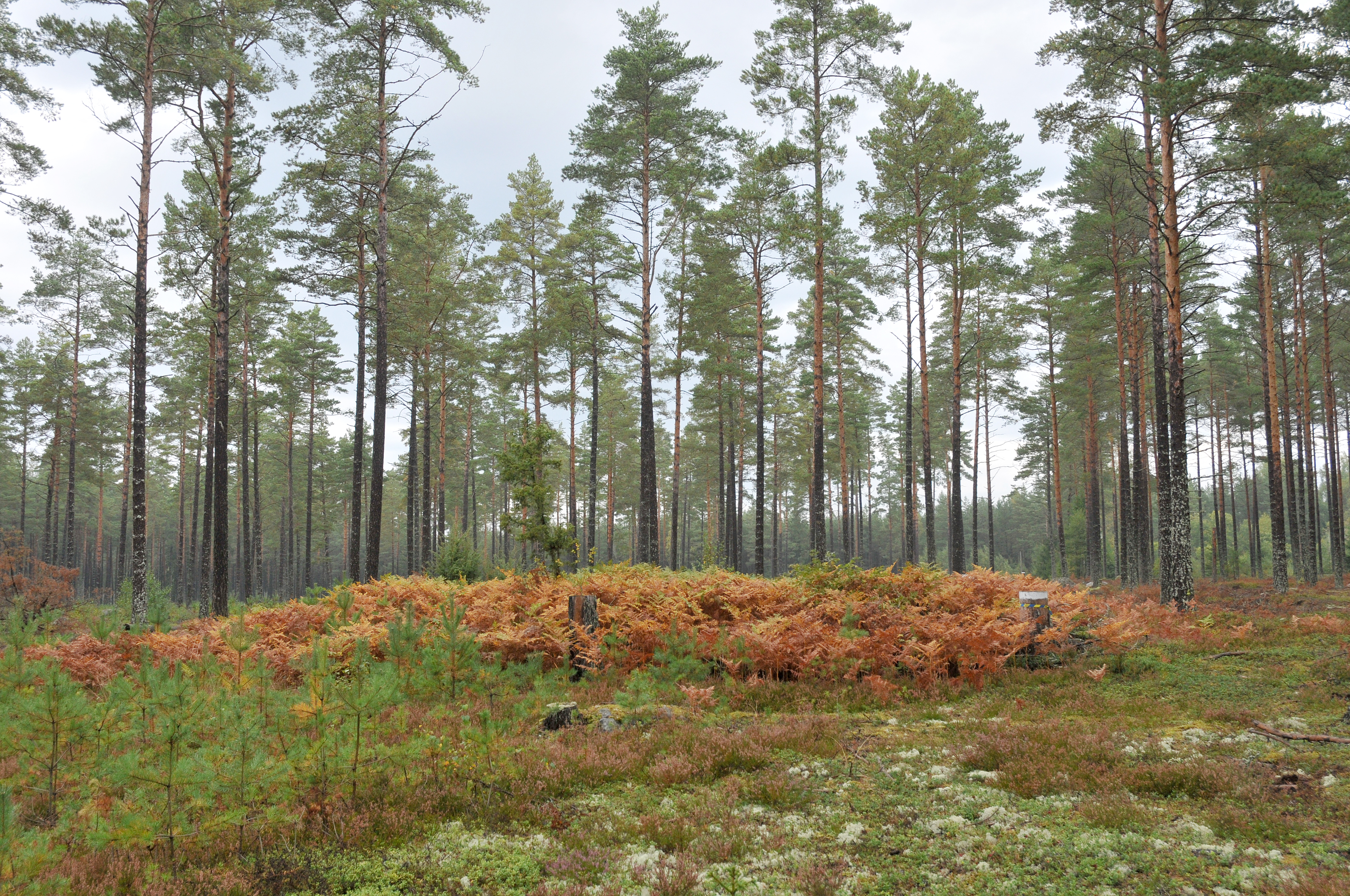 Kolbotten i Södermanland, Sverige.